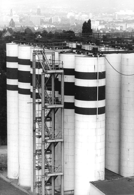 Dresden, Coschütz, Brauerei ADN-ZB Häßler 8.9.81 Dresden: Die 22m hohen Reaktorentürme gehören zur neu erbauten Brauerei in Dresden-Coschütz, in der seit einigen Tagen "Vollbier Hell" und "Deutsches Pilsner" gezapft wird. Der Betrieb nimmt eine Fläche von rund 16 Hektar ein und wird bis 1983 schrittweise seine volle Kapazität von 1,3 Millionen Hektoliter pro Jahr erreichen. (siehe 3N)